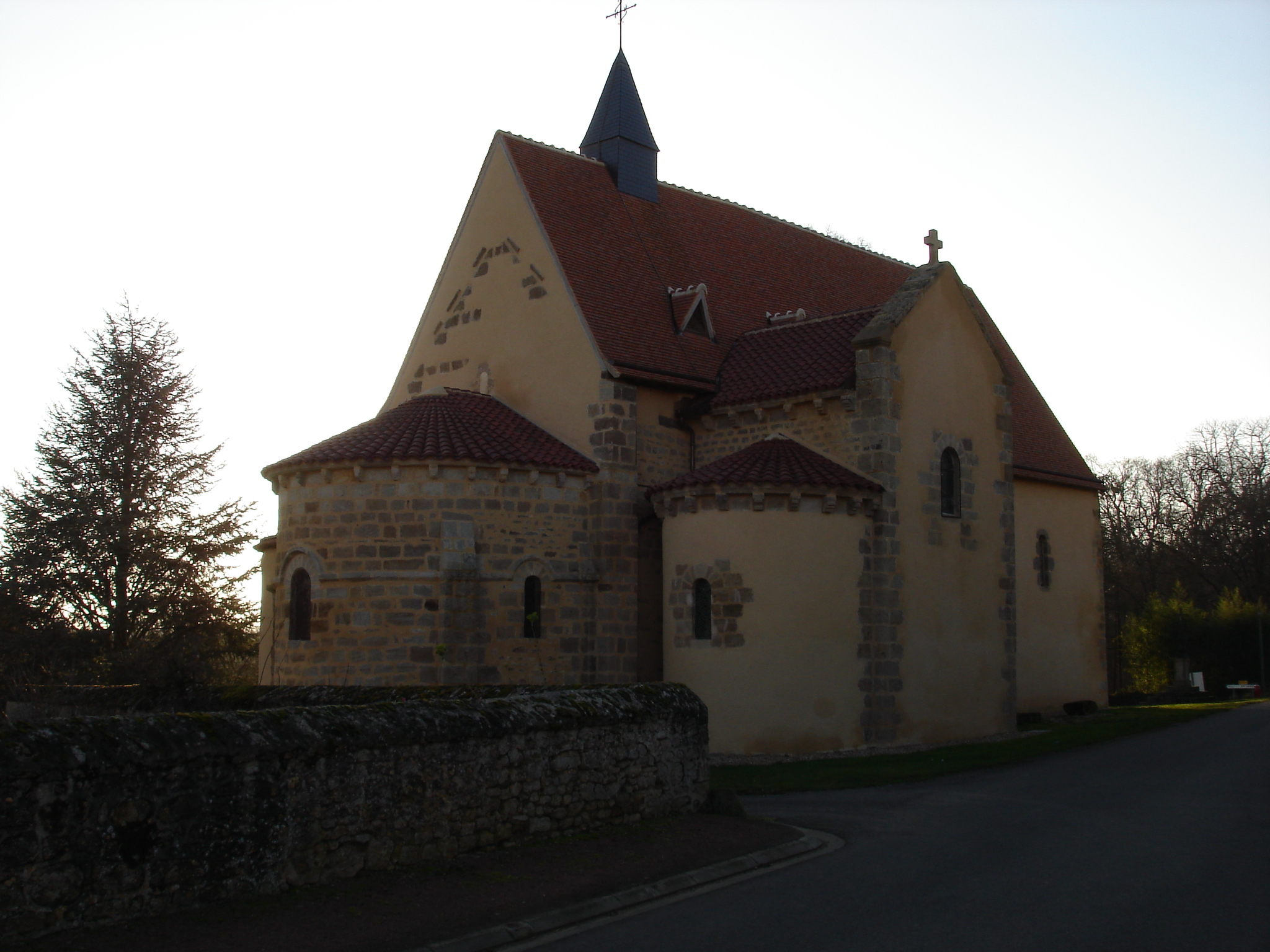 Montlevicq (36) : L'église Saint-Pierre.